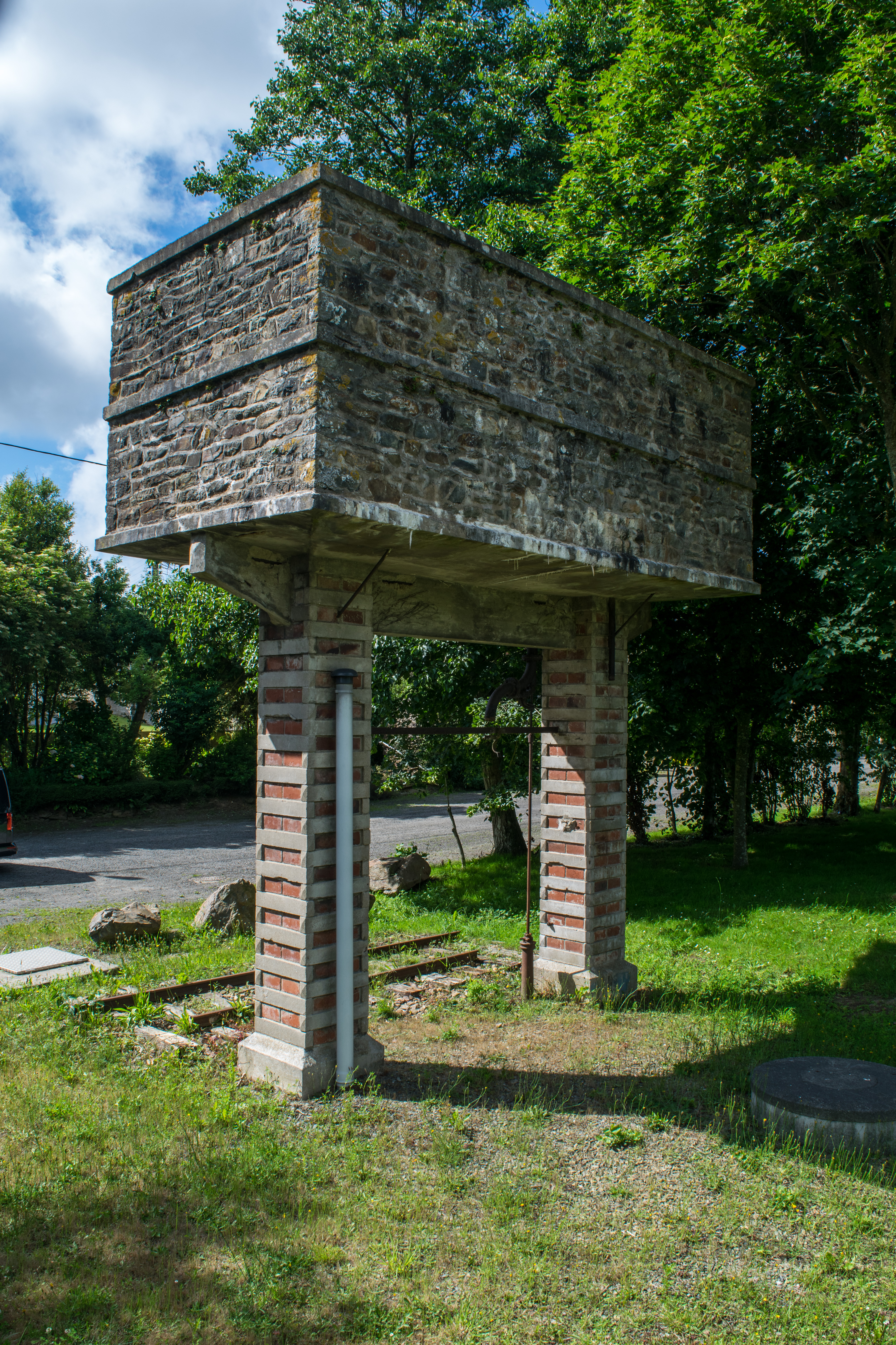 Chateau D'eau utilisé pour le Chemin de Fer des Côtes-du- Nord, au lieu-dit : "Langazou" (Minihy-Tréguier)